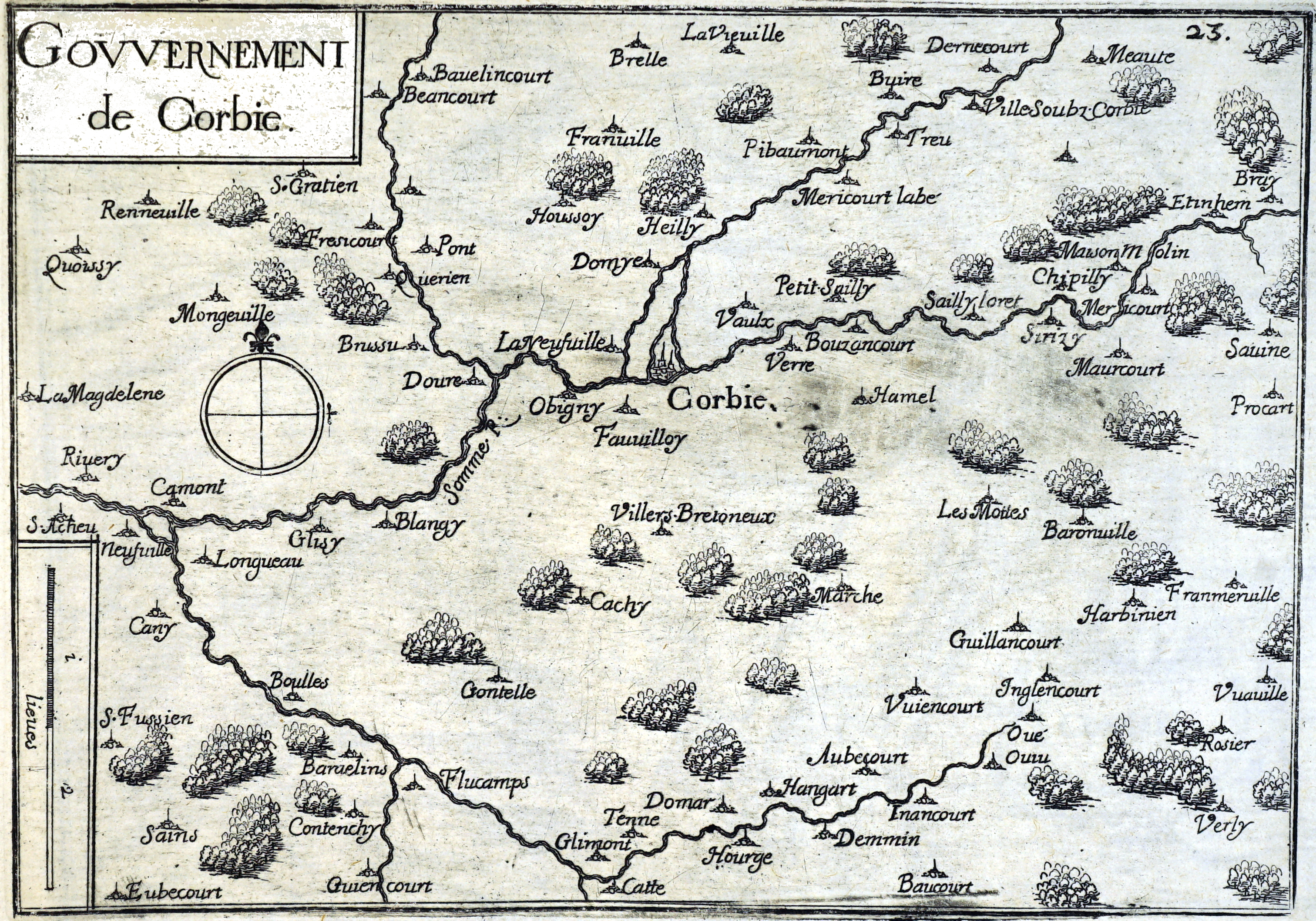 dessin de Tassin, 1634.